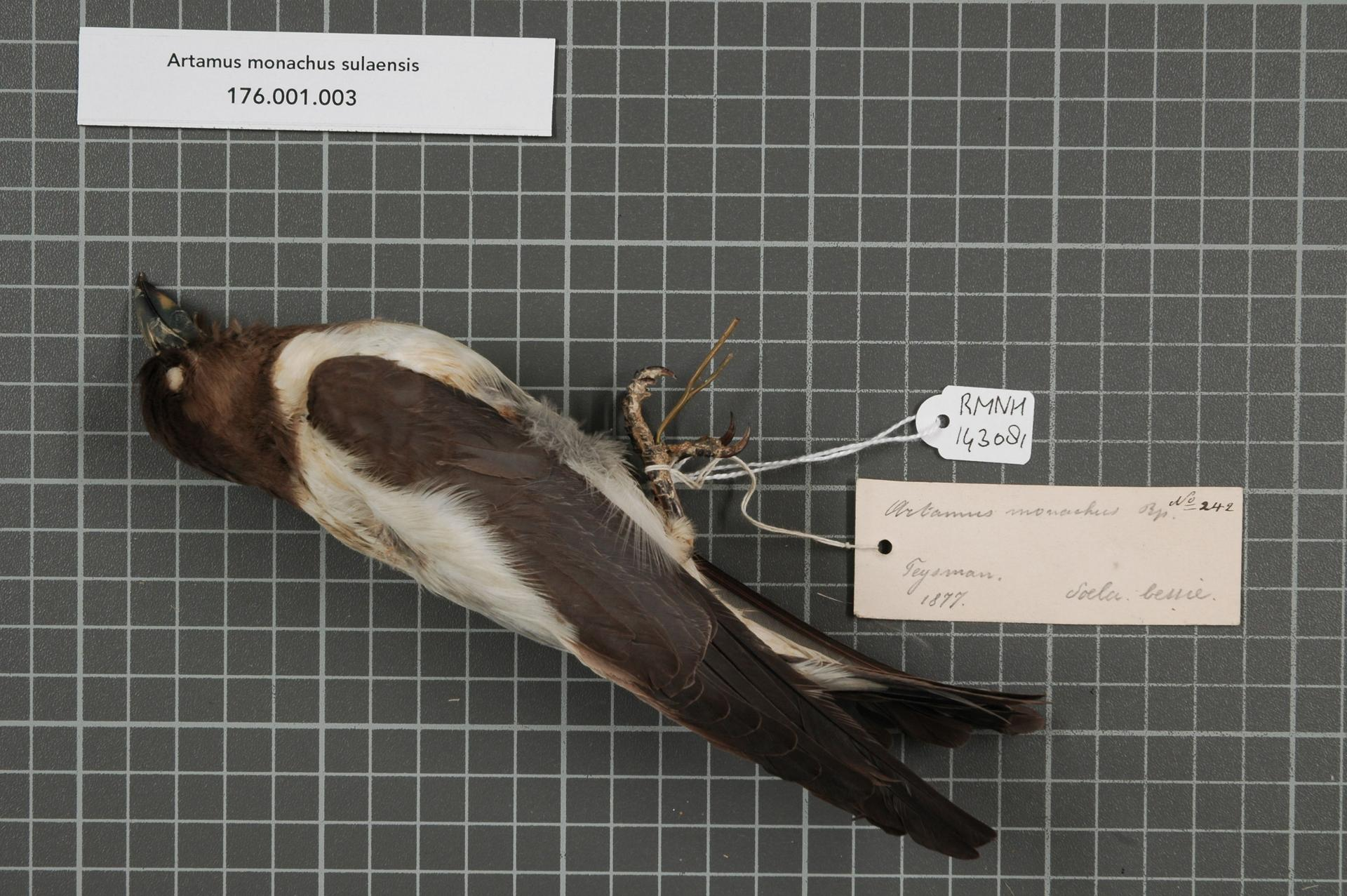 Artamus monachus sulaensis Neumann, 1939